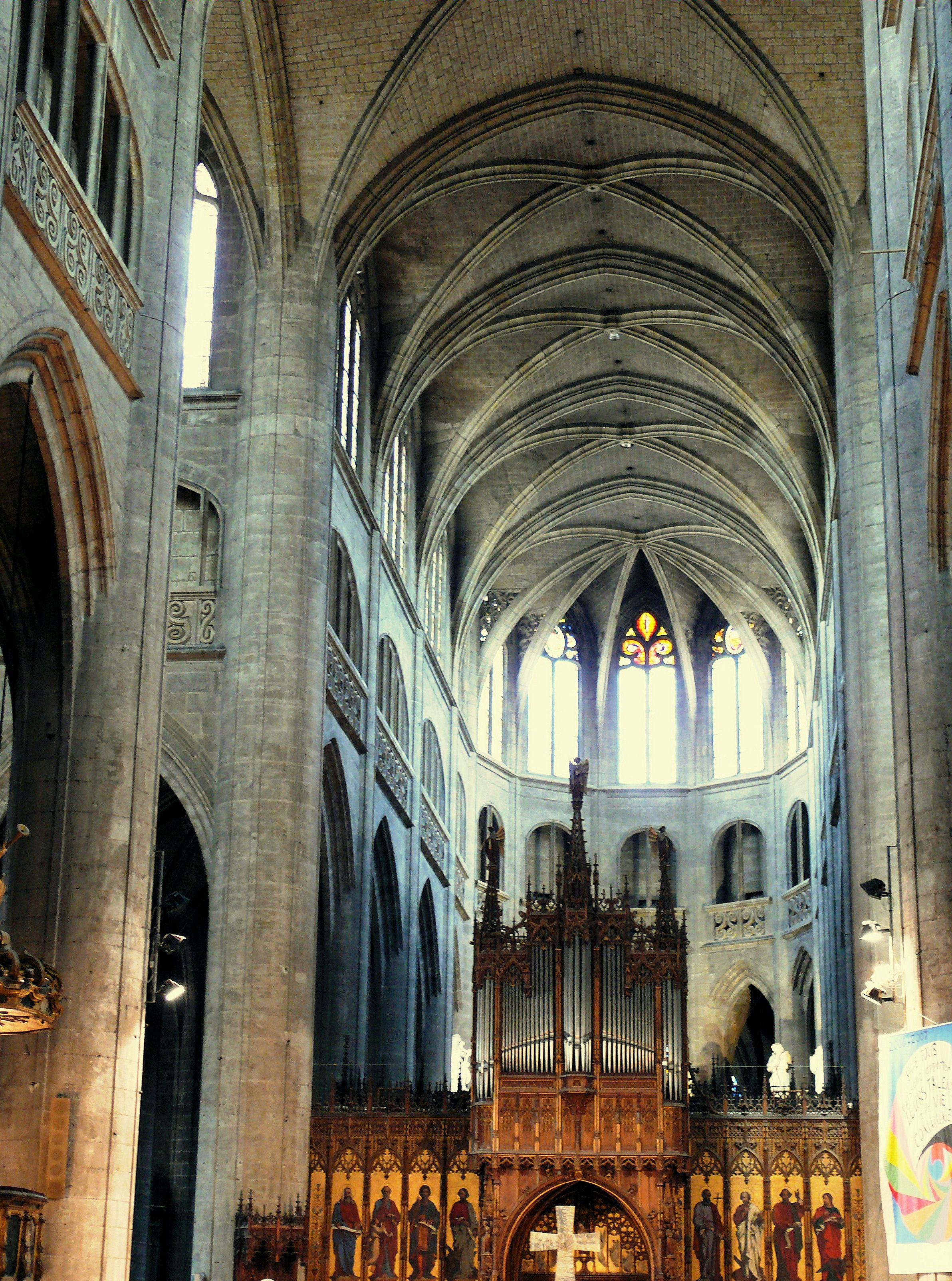 Auch - Cathédrale Sainte-Marie - Nef centrale